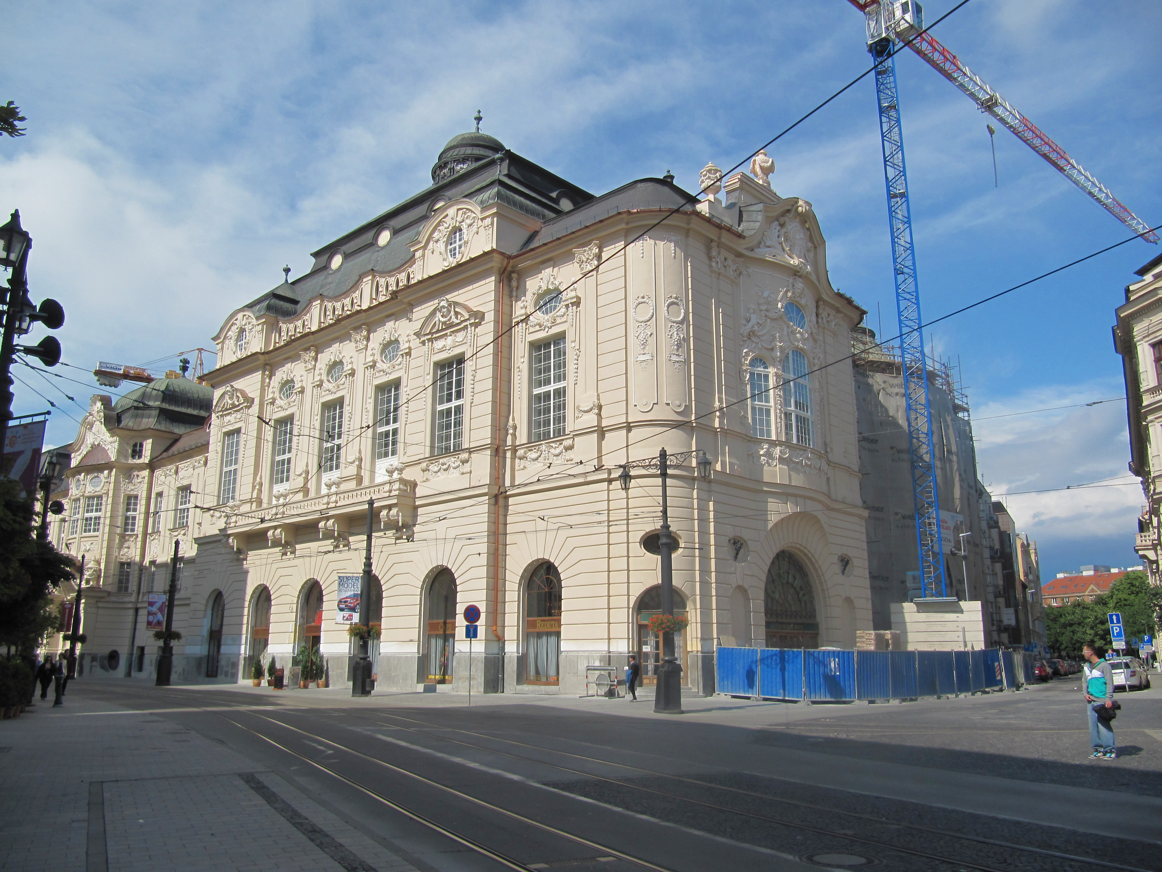 Bratislava, námestie Ľudovíta Štúra, Reduta.